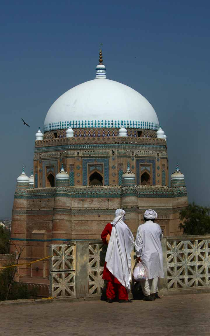 Masoleum of Rukn-i-Alam, Multan, Pakistan.